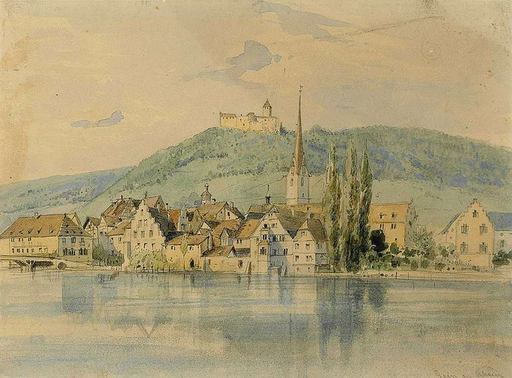 Stein am Rhein und Burg Hohenklingen, Pencil and watercolours, 21 × 28,5 cm.